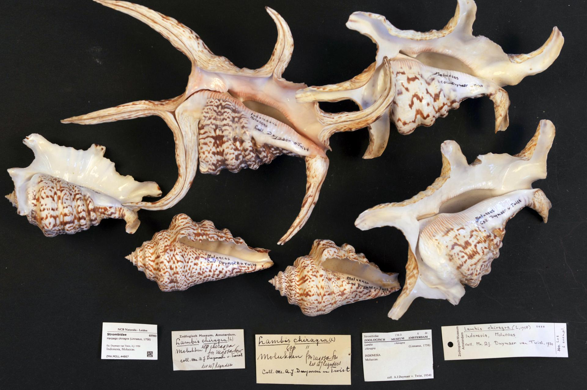 Harpago chiragra (Linnaeus, 1758)